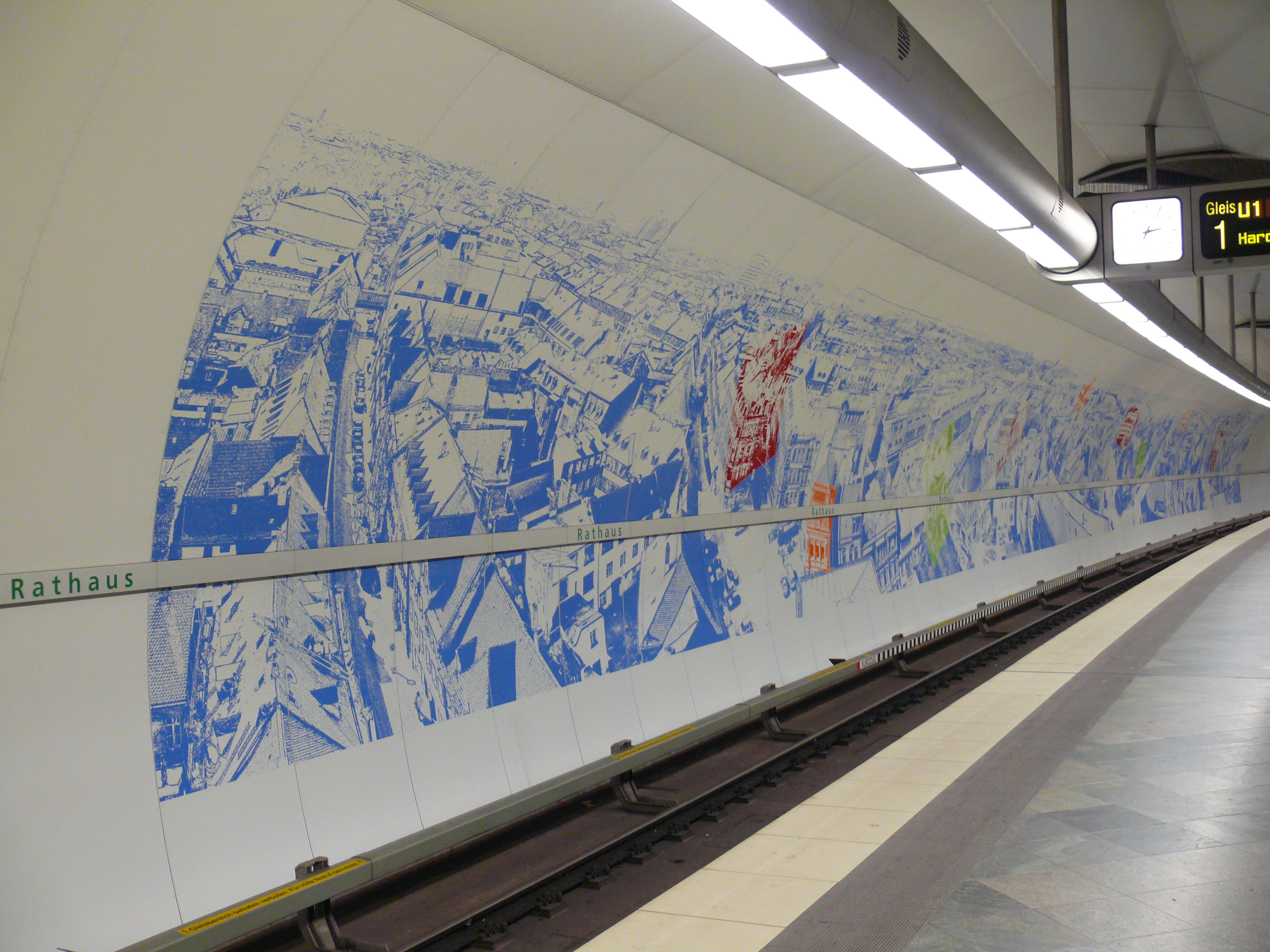 An den Bahnsteigwänden des U-Bahnhofs Rathaus in Fürth, befinden sich Panoramaansichten der Stadt.